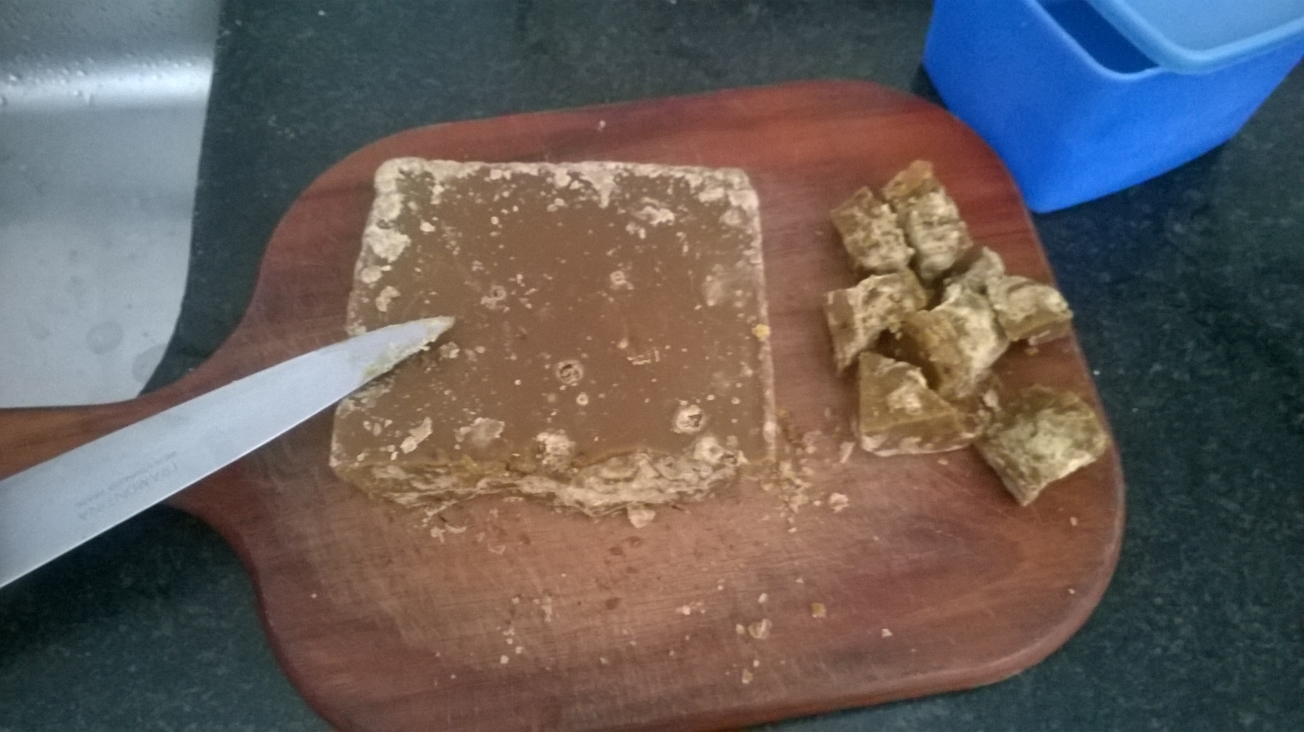 Uma peça de Rapadura